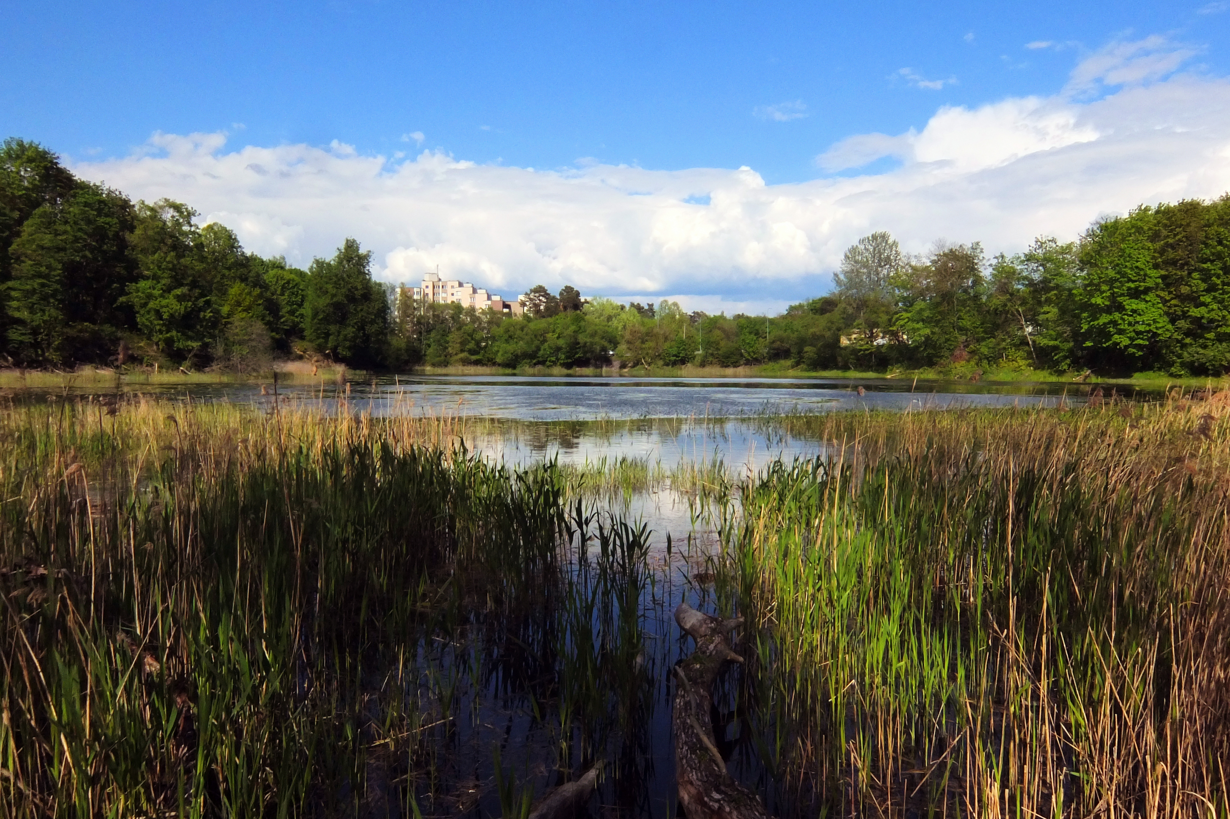 Jeruzalės tvenkinio nuotrauka iš Jeruzalės miško.